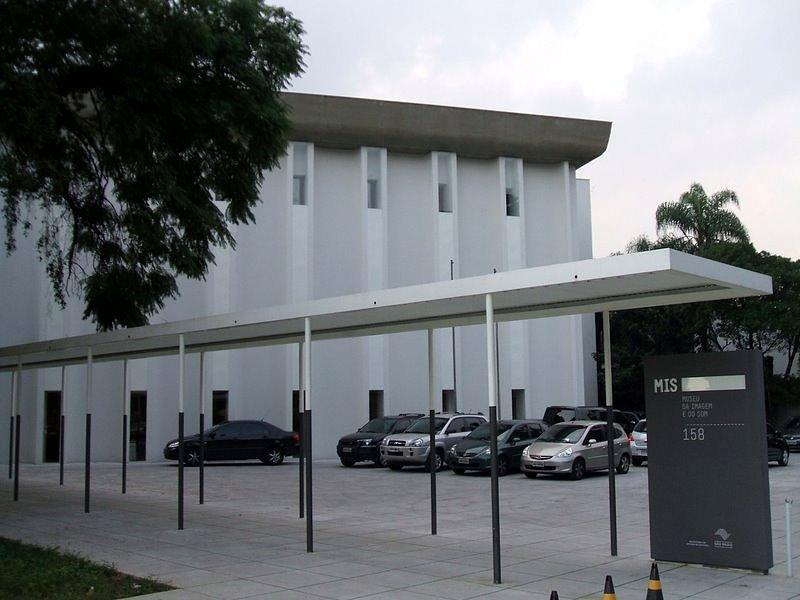 Museu da Imagem e do Som de São Paulo, Brasil. Entrada pela Av. Europa.